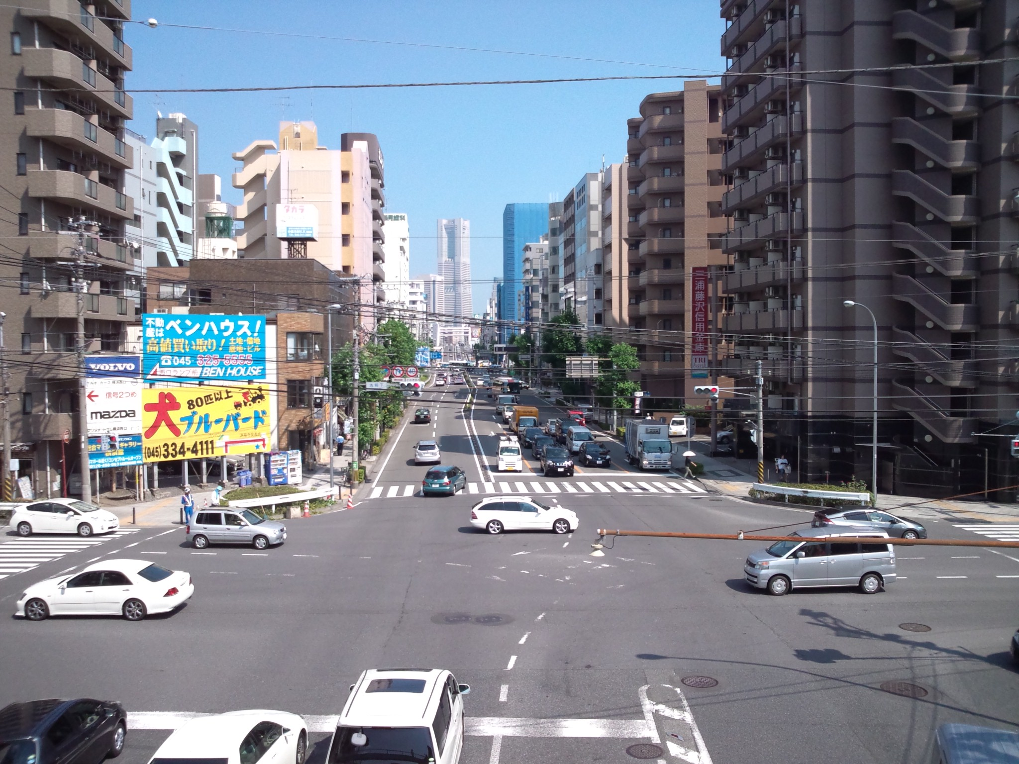 浅間下交差点